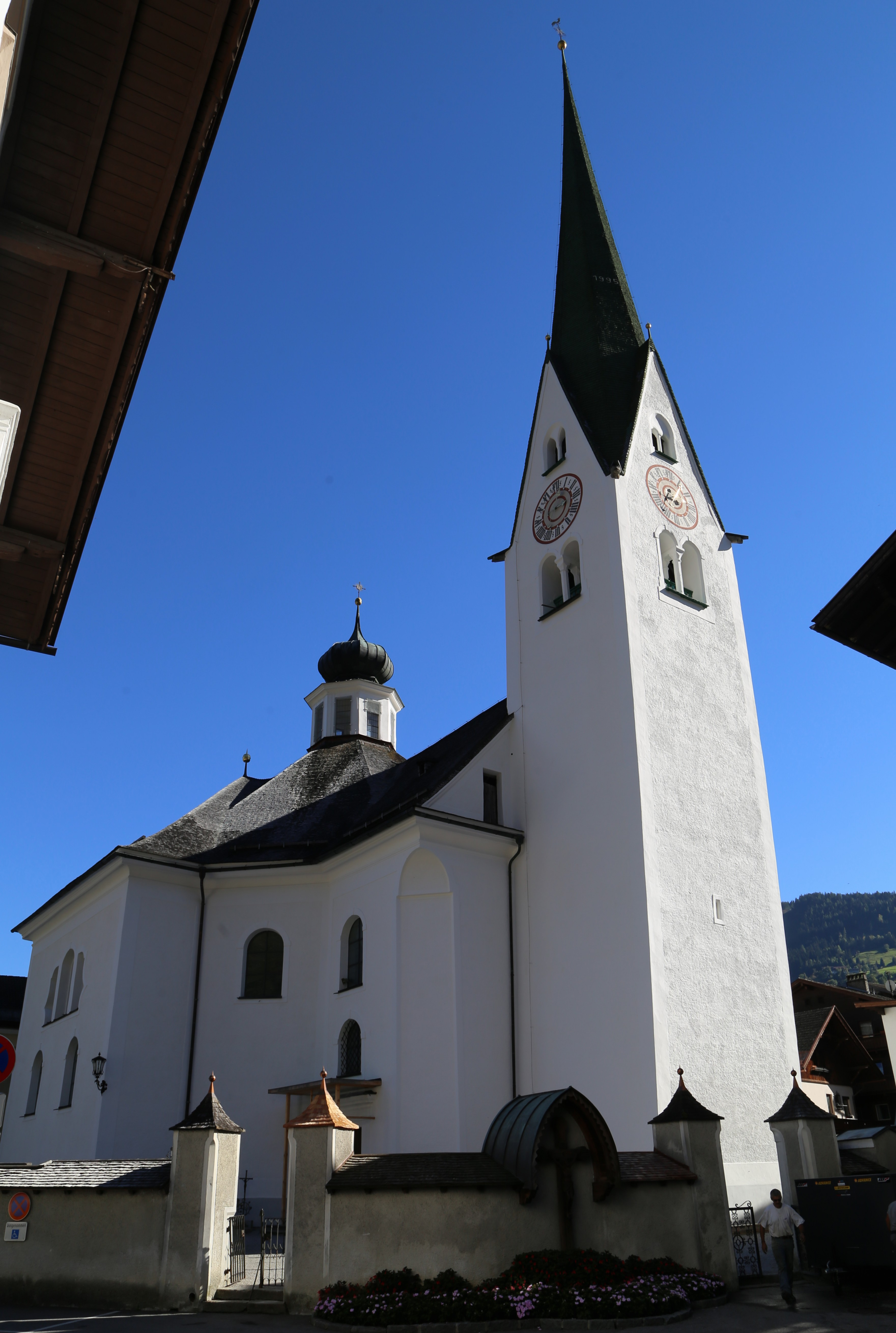 Unterdorf 16, Zell-am-Ziller; Kath. Pfarrkirche hl. Veit